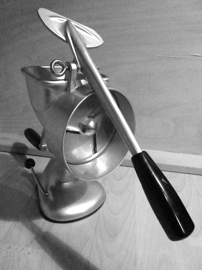 Die Minna (Herstellerbezeichnung; auch Küchen-Minna genannt) ist eine mechanische, mittels Kurbel und Hebeln handbetriebene Küchenmaschine zum Schnitzeln, Reiben, Schneiden, Raspeln und Entsaften von Gemüse und Obst, für das Raspeln von Backzutaten wie Nüsse und Schokolade sowie von Hartkäsen wie zum Beispiel Parmesan. Ansicht mit eingesetzter Schneidscheibe. Im Vordergrund der Hebel für das Andrücken des im Einfüllstutzen befindlichen Schneidguts an die Schneidscheibe.